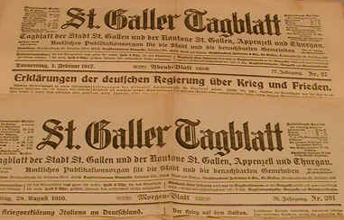 Titelblätter St. Galler Tagblatt 1939